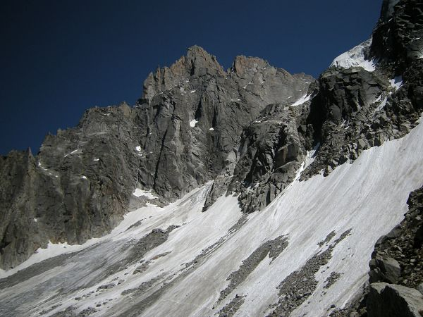 Versant ouest de l'aiguille des Grands Charmoz (à gauche) et de l'aiguille du Grépon (à droite) au dessus du glacier des Nantillons